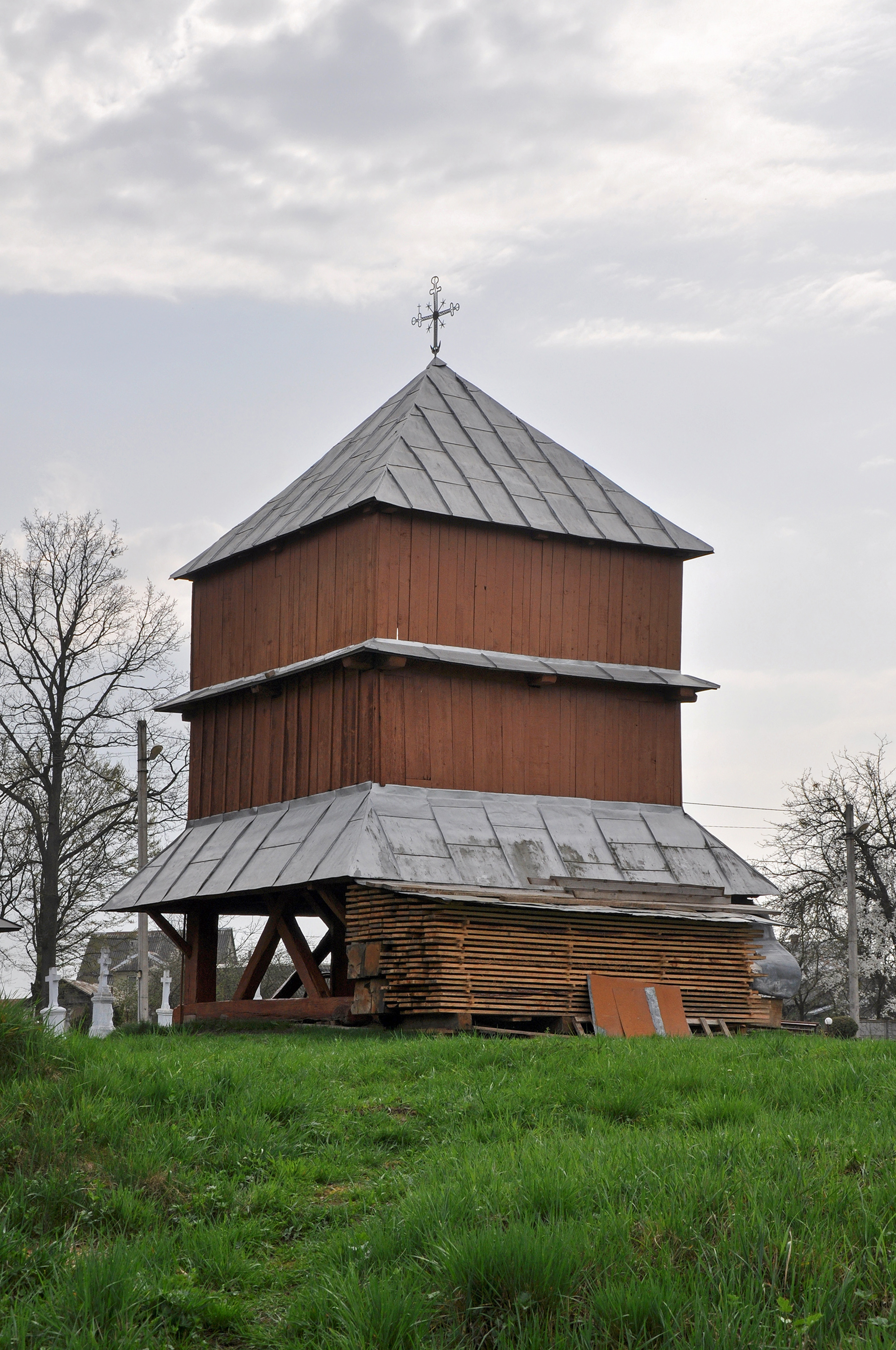 Дзвіниця церкви Симе-она Стовпника (дер.), с.Лісневичі